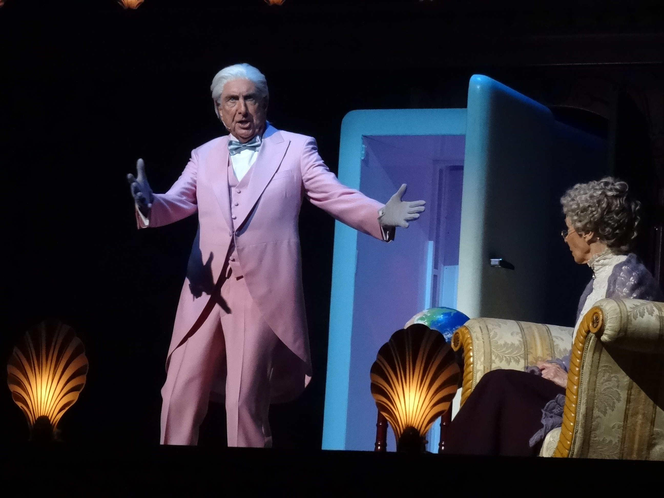 Photo 02-07-14 12 51 26